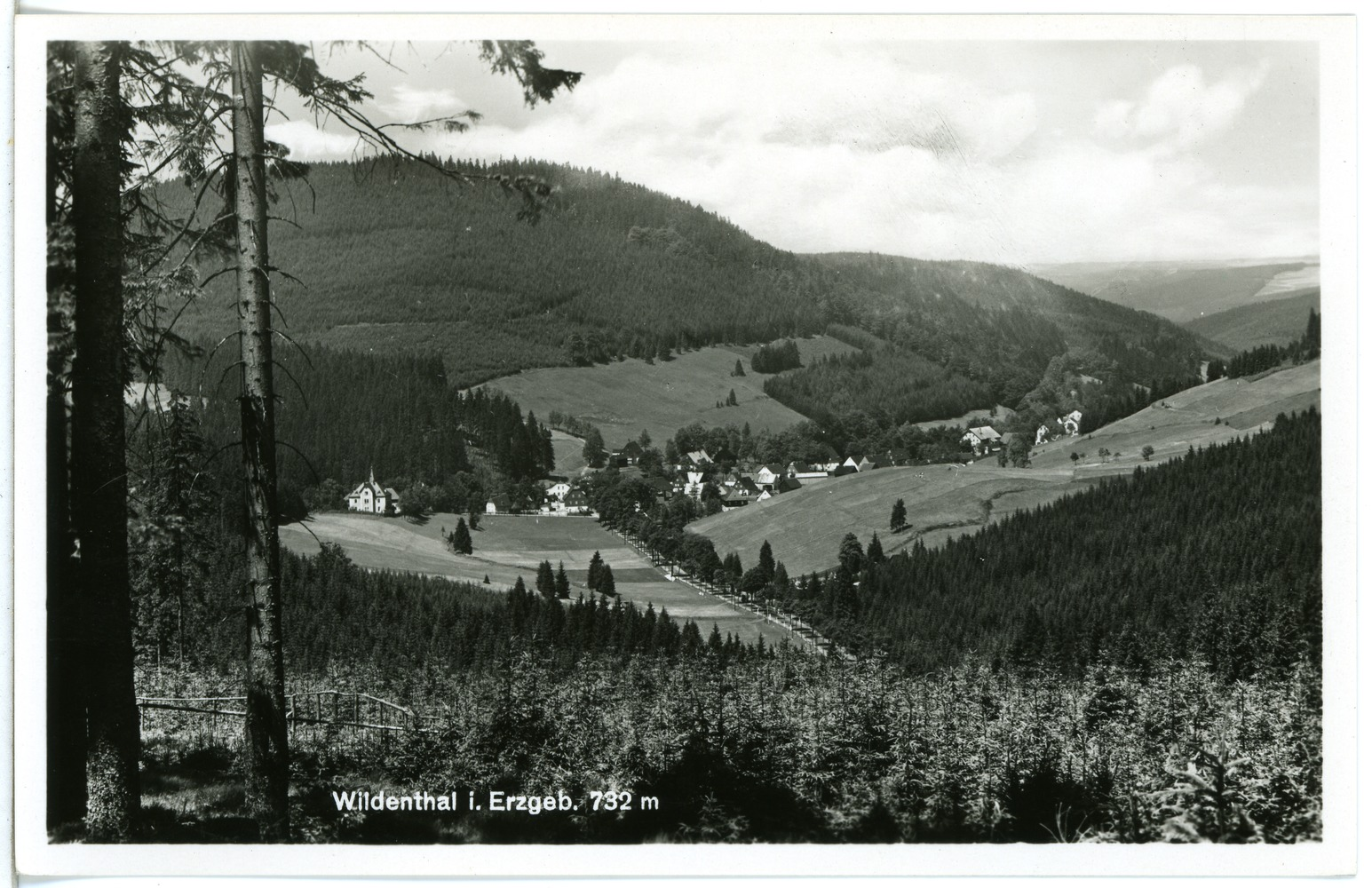 Wildenthal; Blick auf Wildenthal This postcard is from publisher Brück & Sohn in Meißen ( postcard has a unique number 26588 and is available in a higher resolution at the publisher. This images was uploaded in a cooperation project between Wikipedians and the publisher.